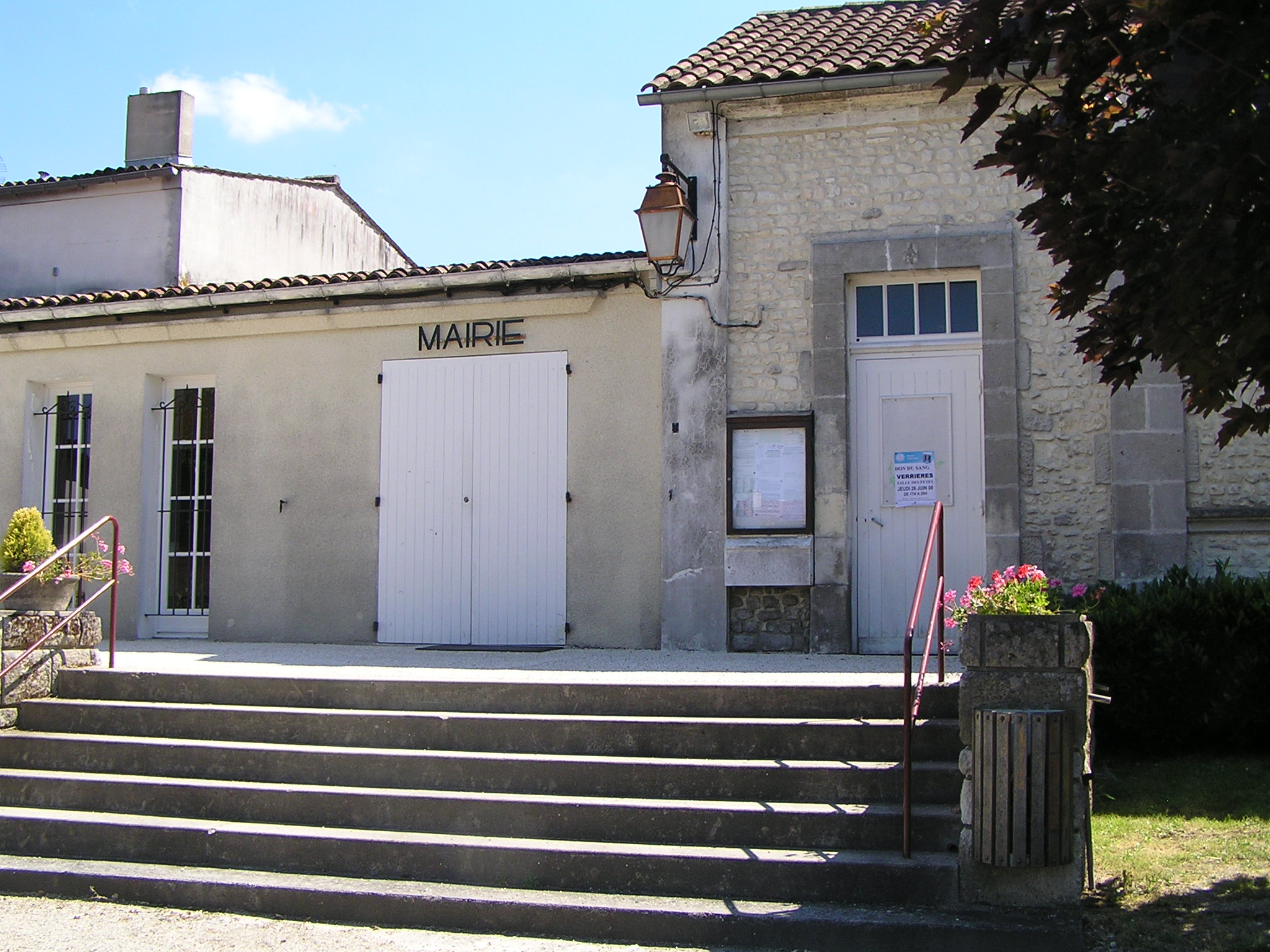 marie de Verrières